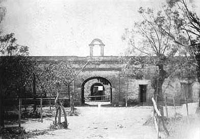 Cuartel General de los Santos Lugares de Rosas, en 1901, antes de su demolición.